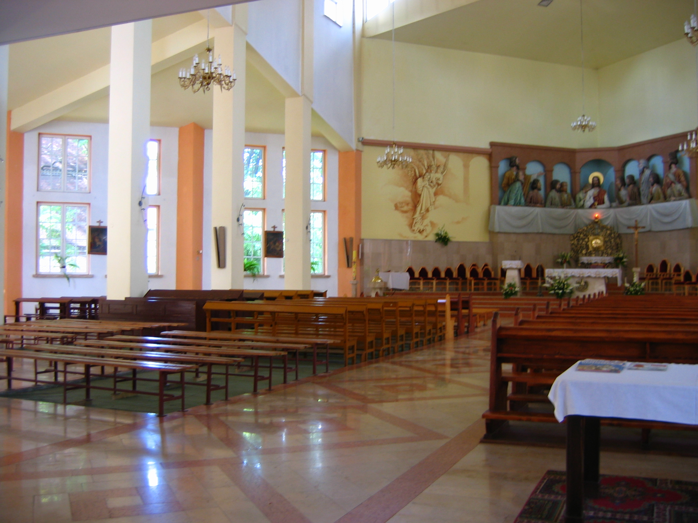 Wnętrze Kościóła Najświętszego Ciała i Krwi Chrystusa w Dąbrowie Górniczej